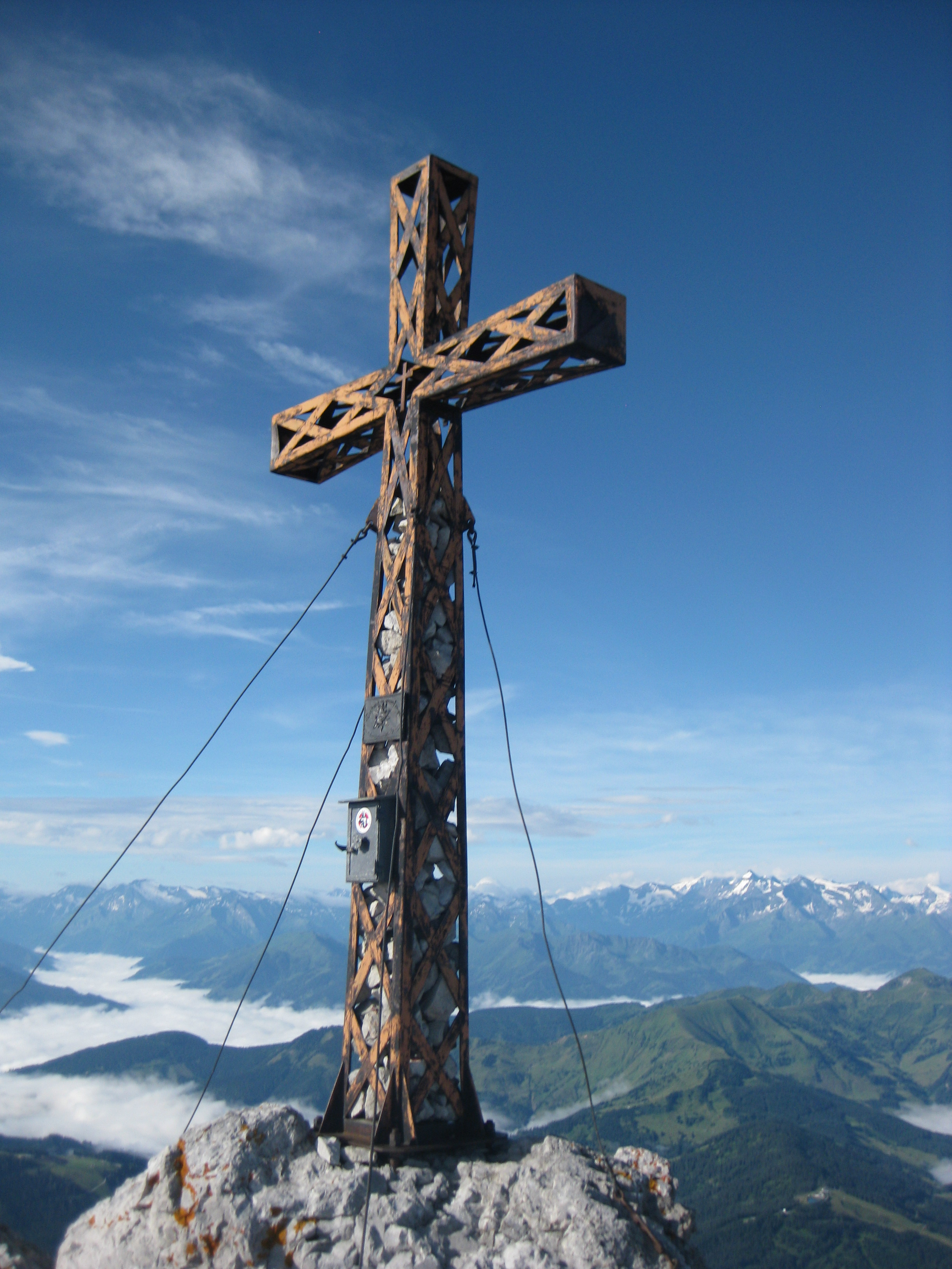 Hochseiler